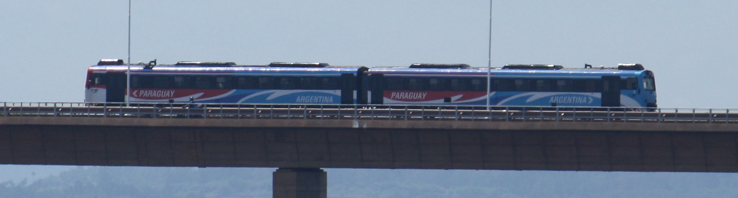 Nuevo tren (dupla liviana) cruzando el Puente Internacional San Roque González de Santa Cruz, prestando servicio regional-internacional entre Posadas, Argentina, y Encarnación, Paraguay. En las puntas de la formación se hace referencia al respectivo país de destino.